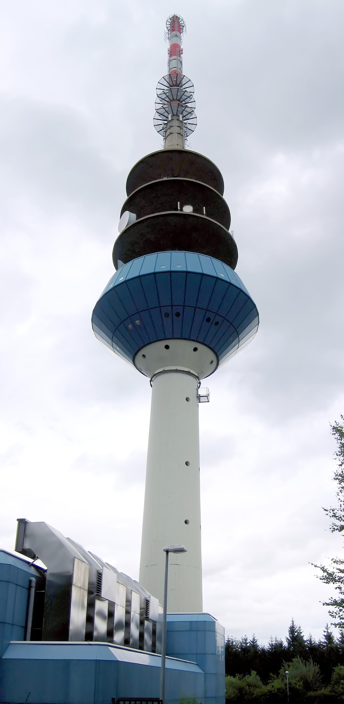 Fernmeldeturm Willebadessen auf der Egge, Willebadessen, Nordrhein-Westfalen, Deutschland.